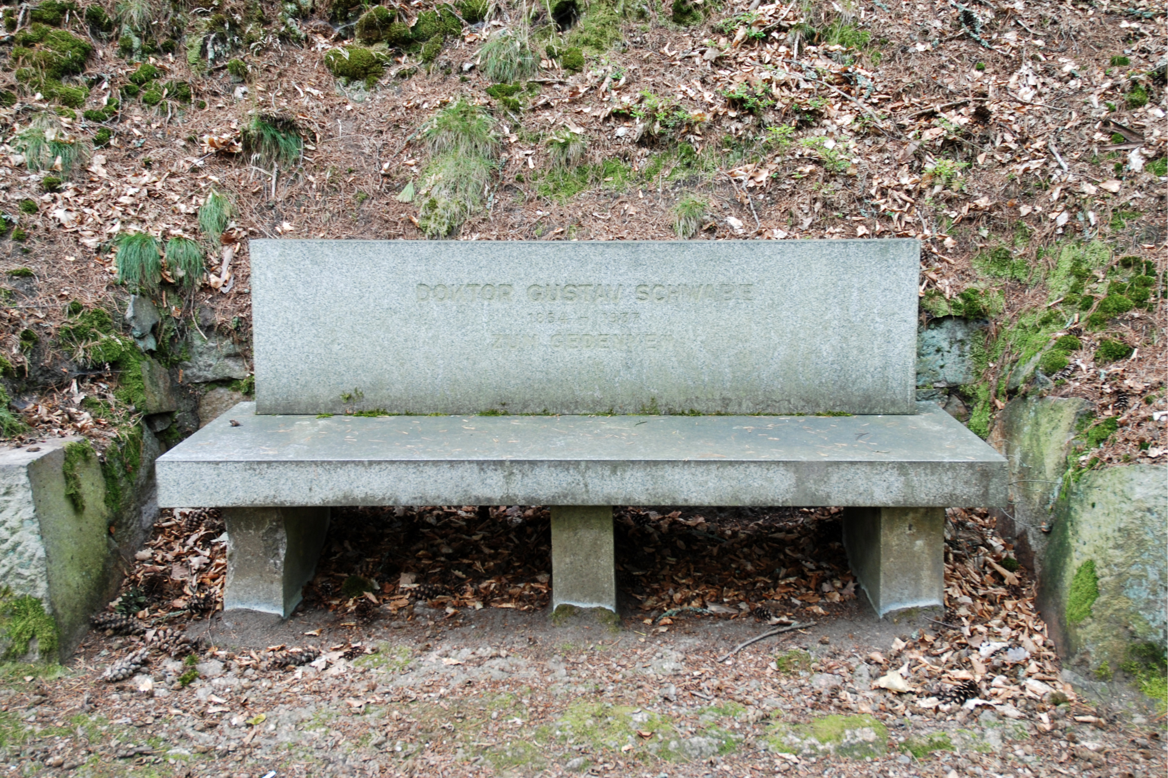 Schwabeho lavička v karlovarských lázeňských lesích